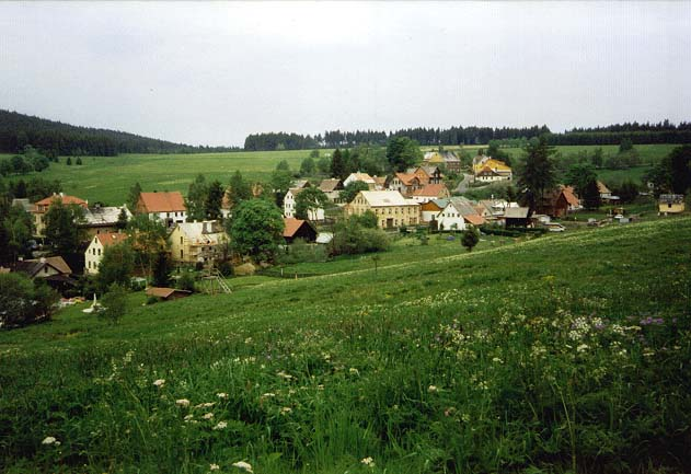 Pohled na hořejší část obce Pernink